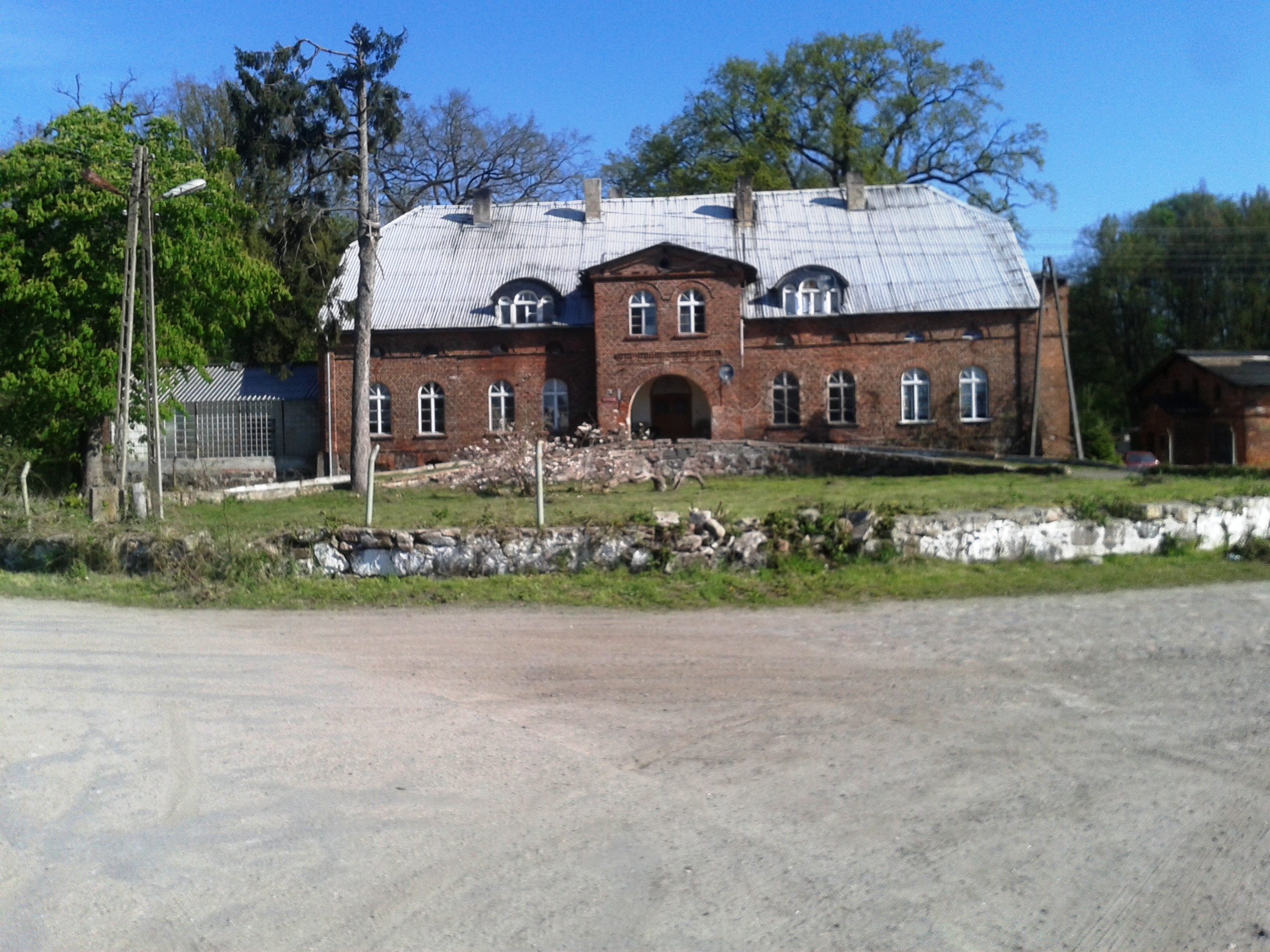 Widok na dworek w Malińcu